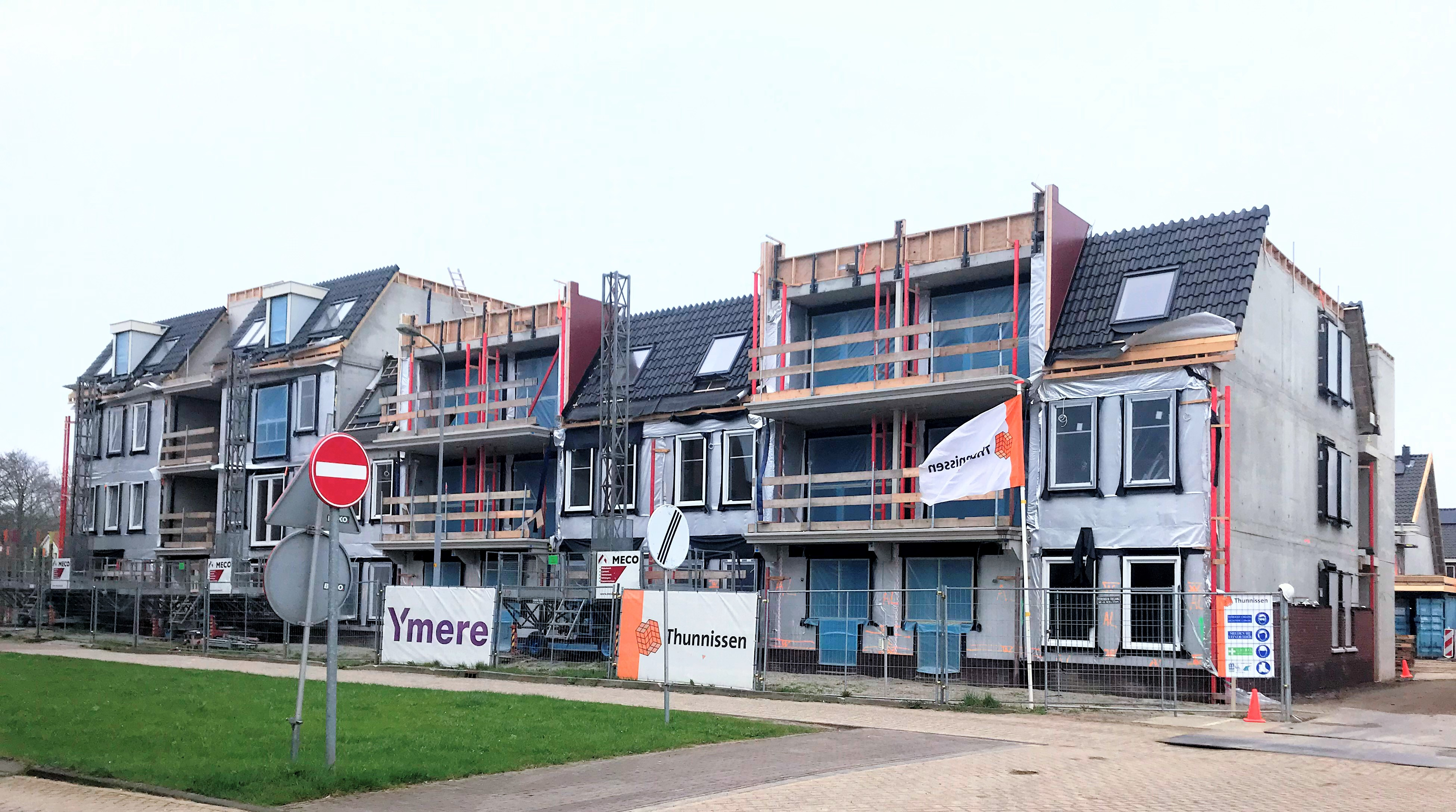 Een nieuwbouw project van Ymere in Nieuw-Vennep